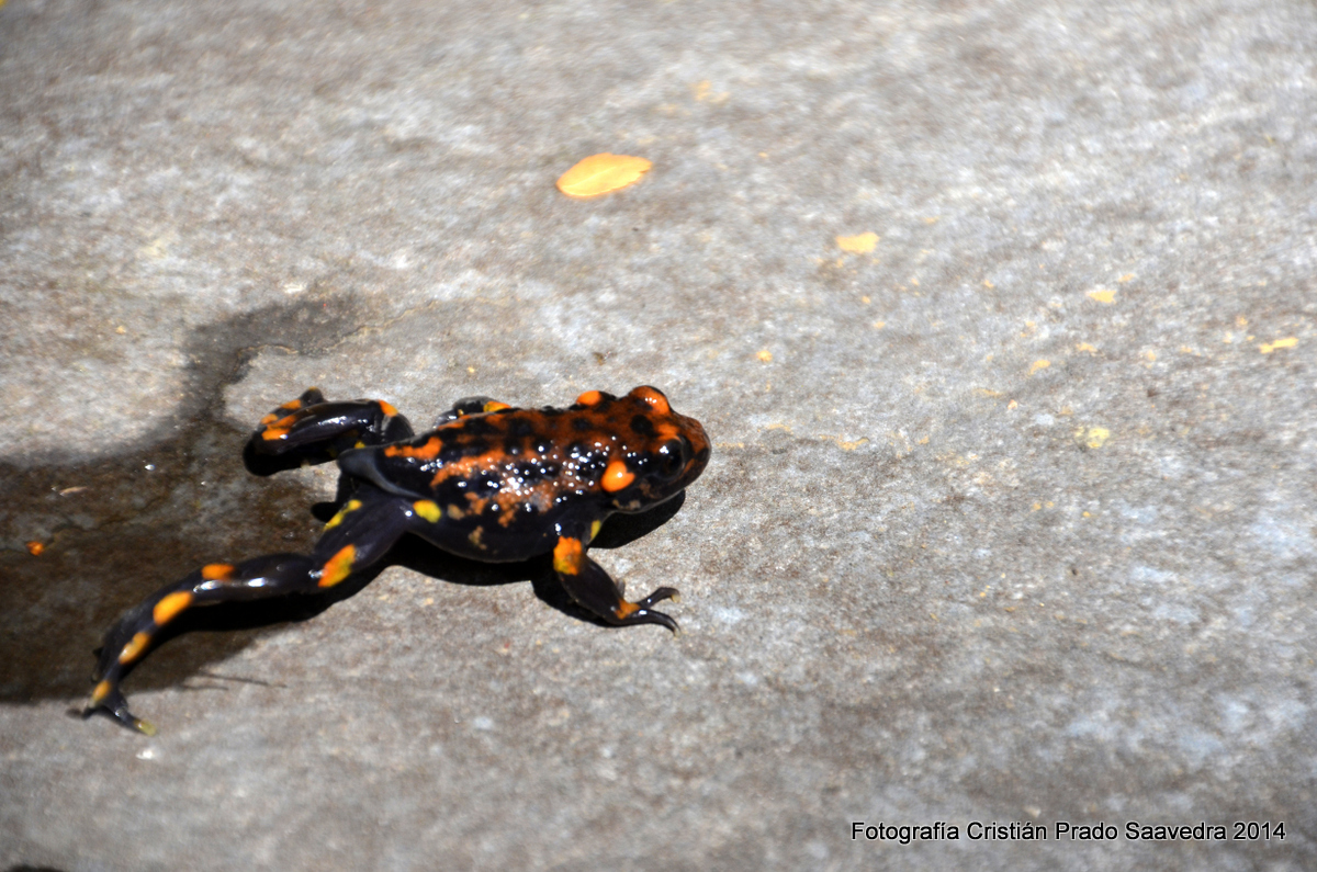 Telmatobufo venustus